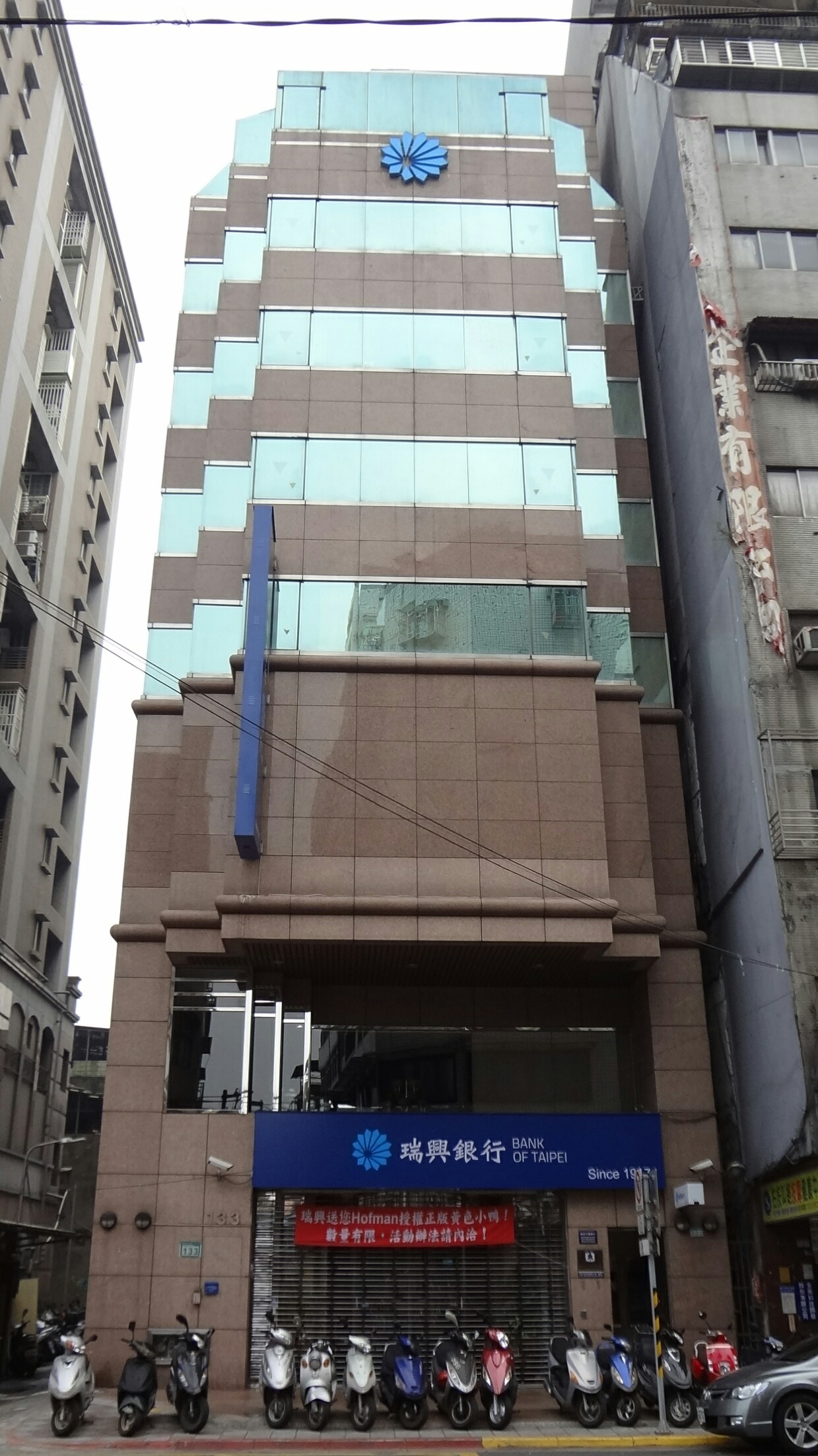 中文（台灣）: 瑞興商業銀行營業部，地址：臺北市大同區延平北路二段133號。